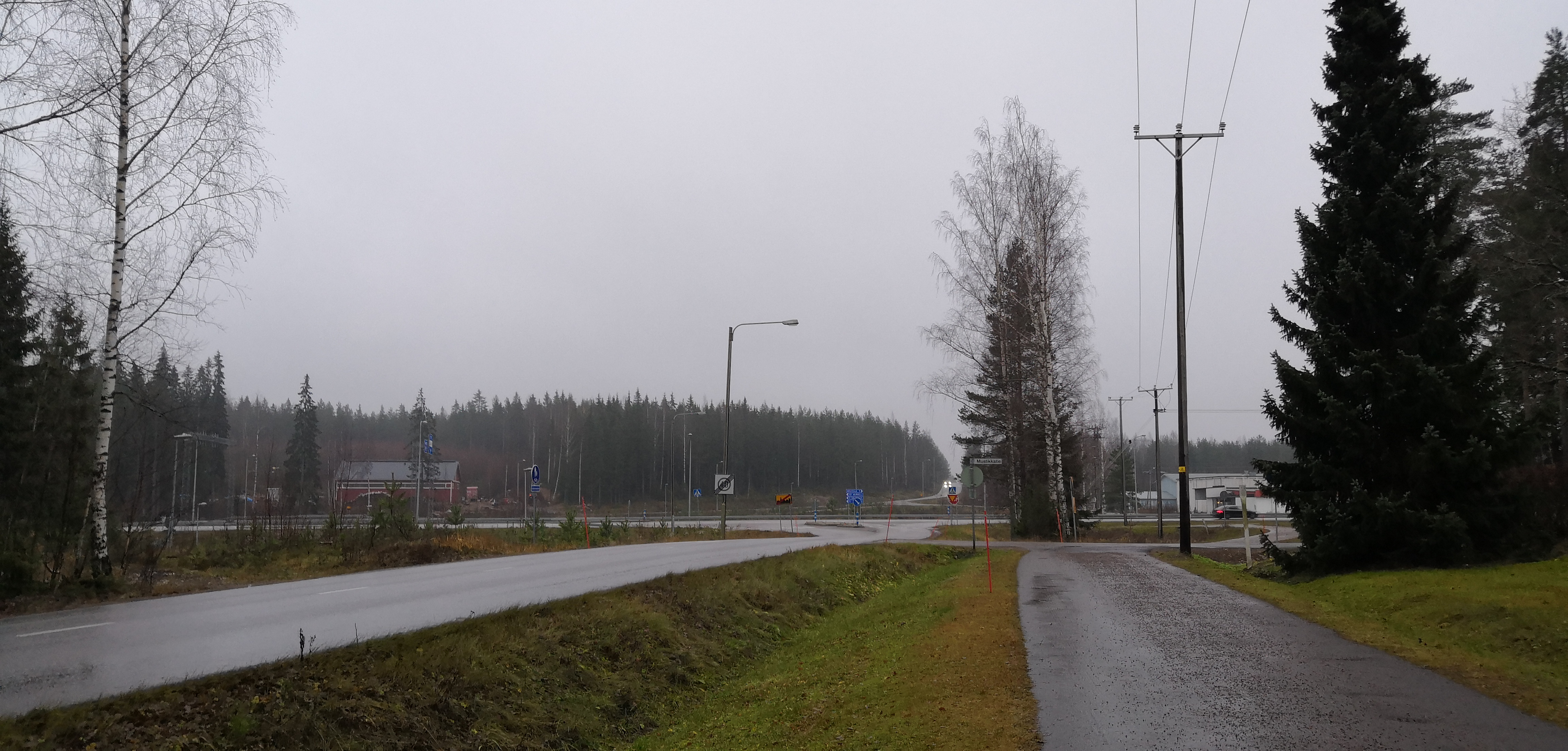 Valtatien 15 ja Jyrääntien risteys Valkealassa syksyllä 2019